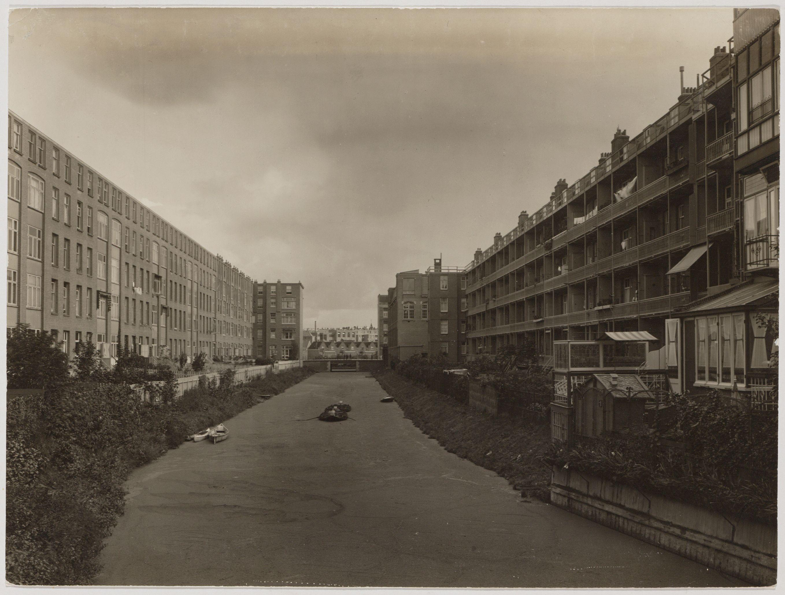 Beschrijving De Krommert Binnen de Admiraal de Ruijterweg. Gezien in oostelijke richting naar brug 254, in de Reinier Claeszenstraat. Documenttype foto Vervaardiger Leenheer, Cornelis G. (1869-1942) Collectie Collectie Leenheer, Martelhoff, Jansen Datering 1925 t/m 1930 Geografische naam Krommert Admiraal De Ruijterweg Inventarissen Afbeeldingsbestand 010118000325